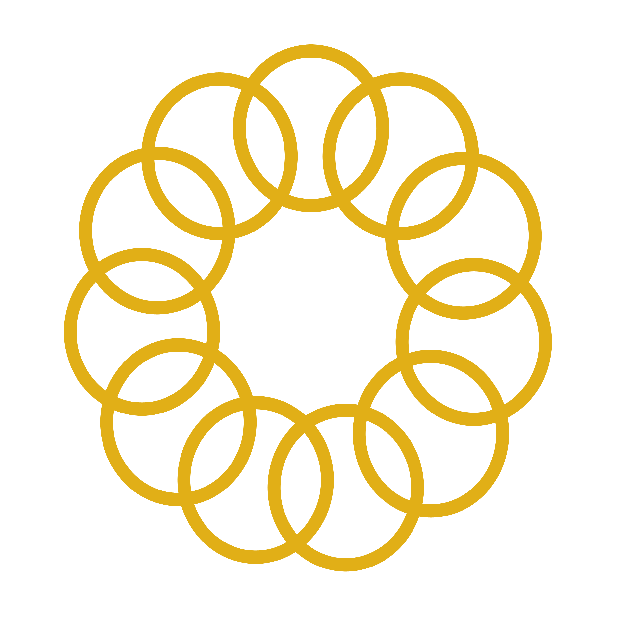 สัญลักษณ์การแข่งขันกีฬาซีเกมส์ โดยในปัจจุบันมี 11 ห่วง ซึ่งหมายถึง 10 ประเทศในสมาชิกอาเซียน และ 1 ประเทศในภูมิภาคเอเชียตะวันออกเฉียงใต้